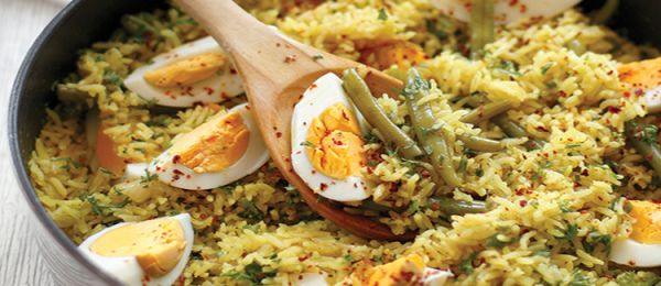 şeşəndaz plov